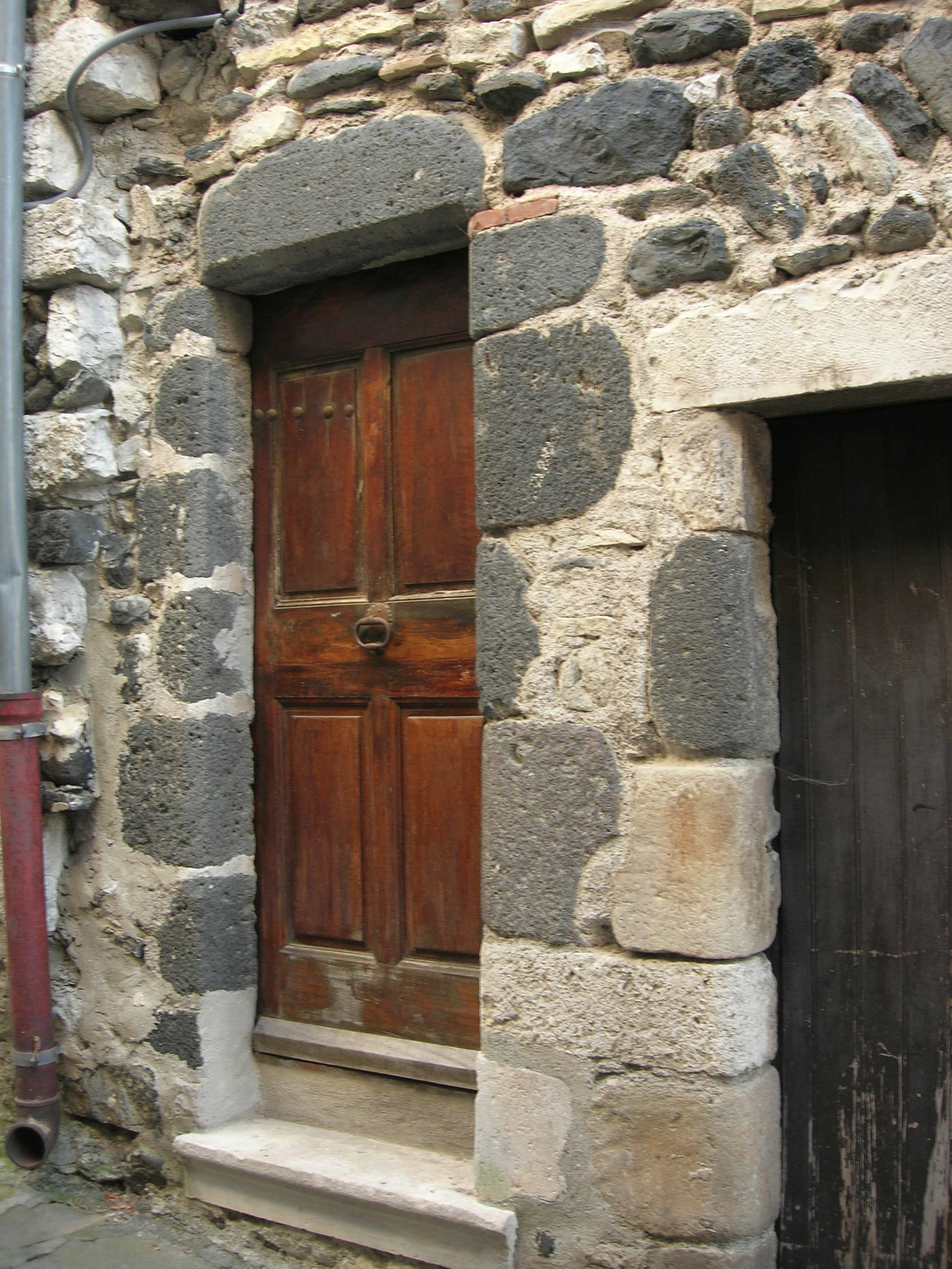 Porte de la maison-atelier du peintre français Jean Le Moal à Alba-la-Romaine en Ardèche, France.